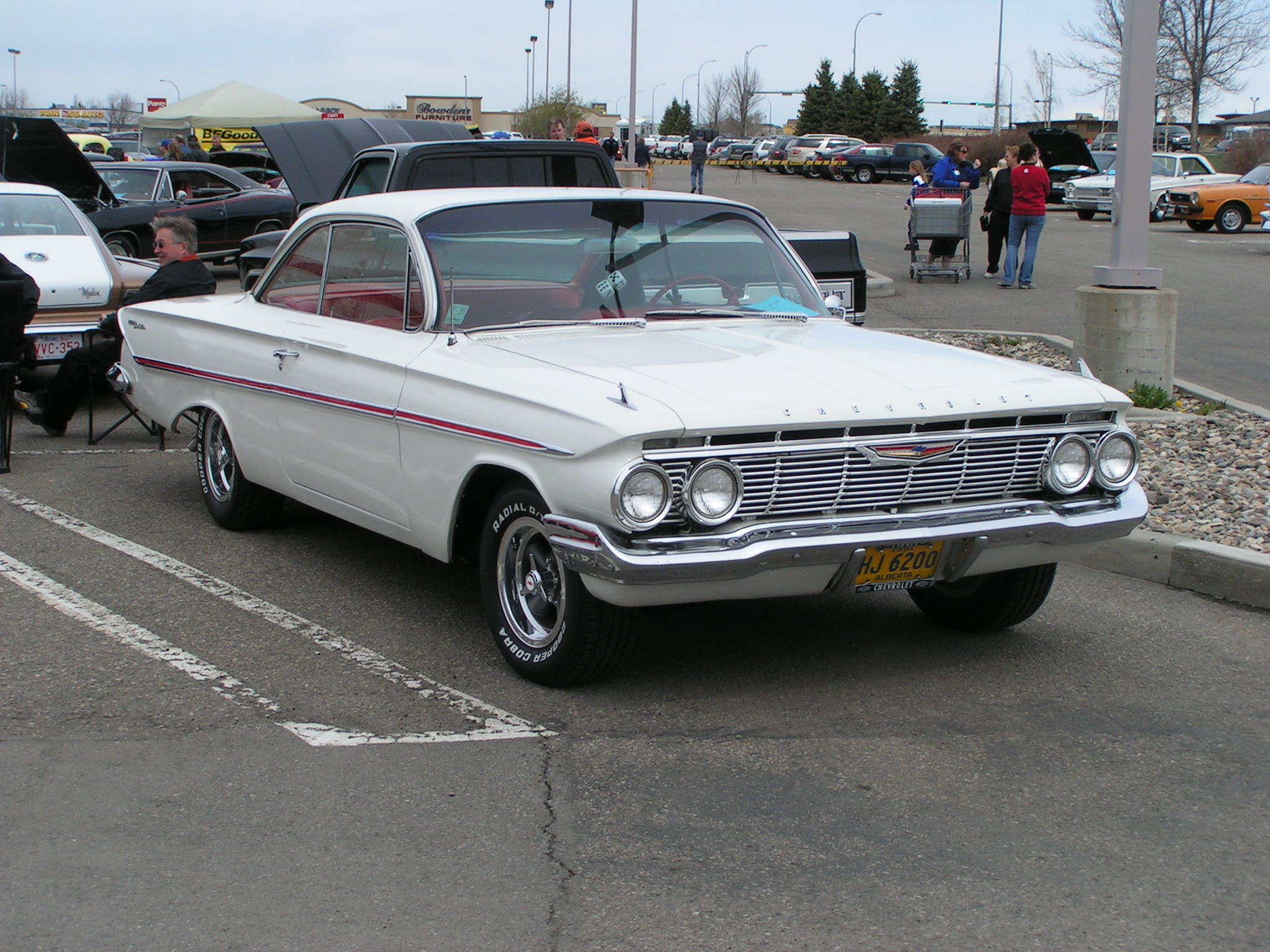 1961 Chevrolet Belair bubbletop